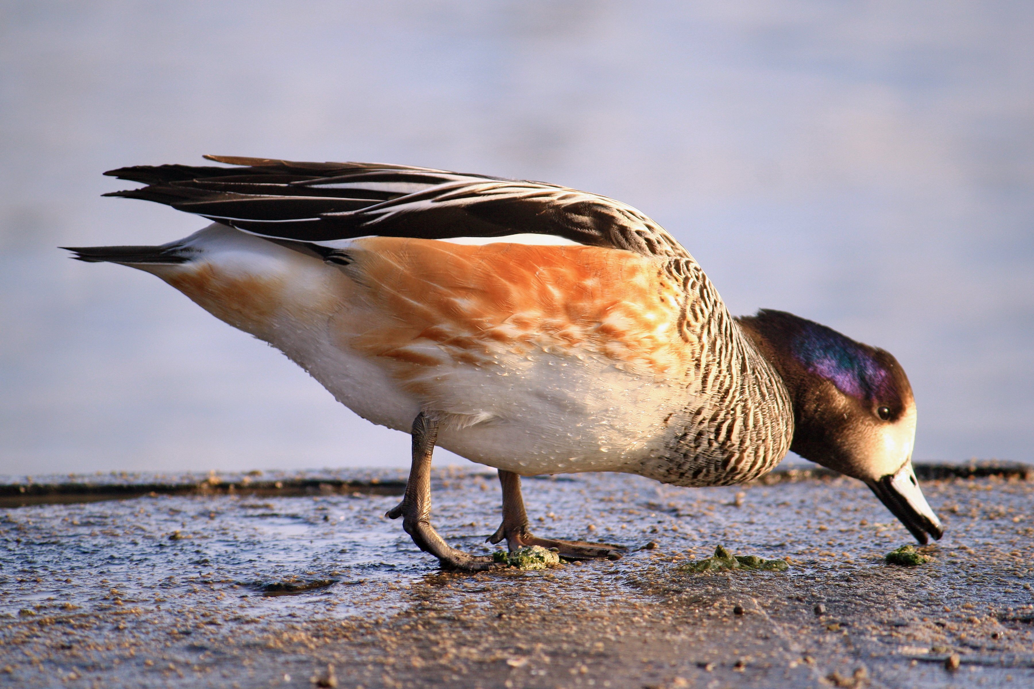 Escaped Anas sibilatrix at Zürichhorn lido in Zürich-Seefeld (Switzerland)